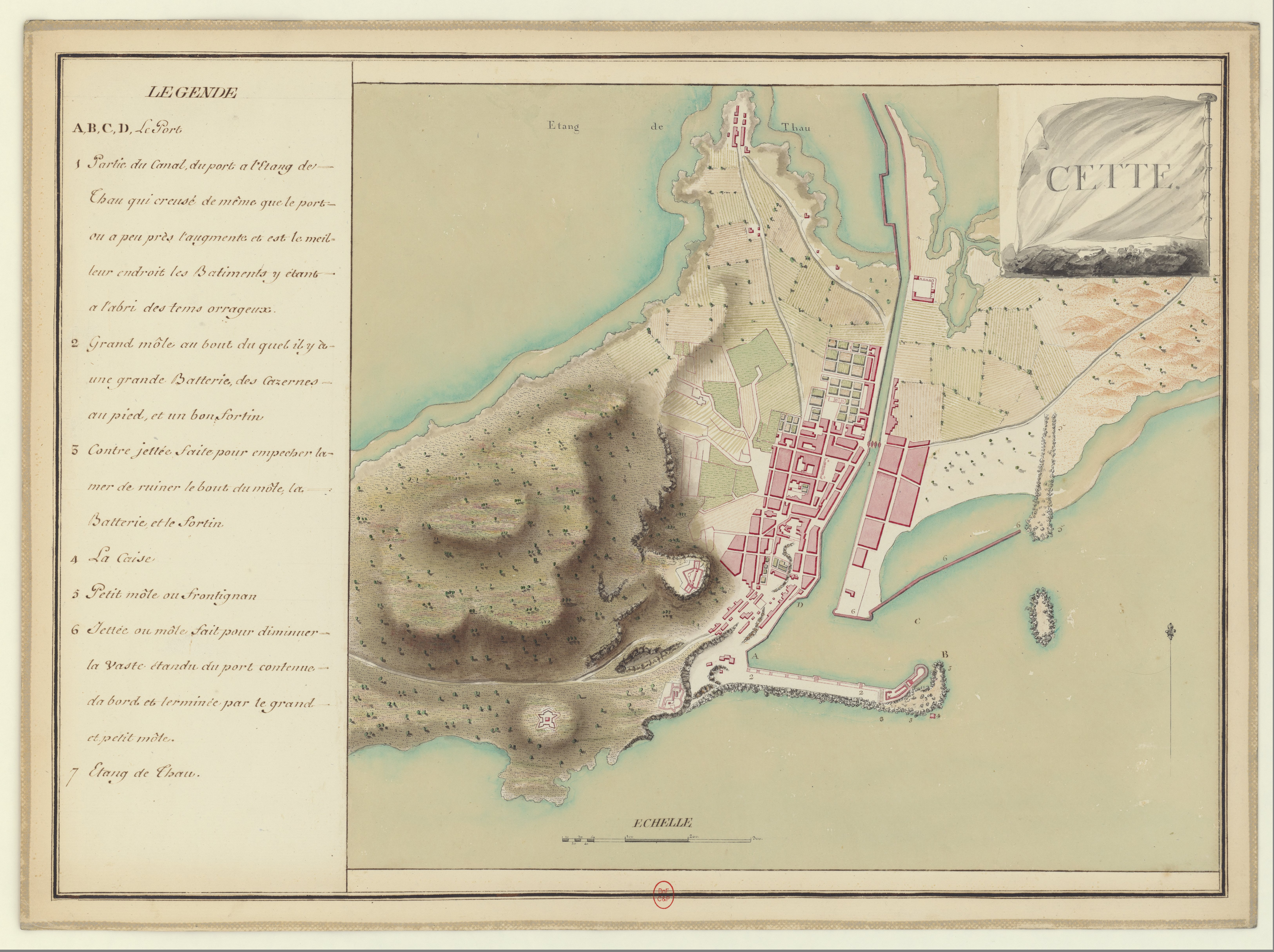 Carte du port de Sète en 1777